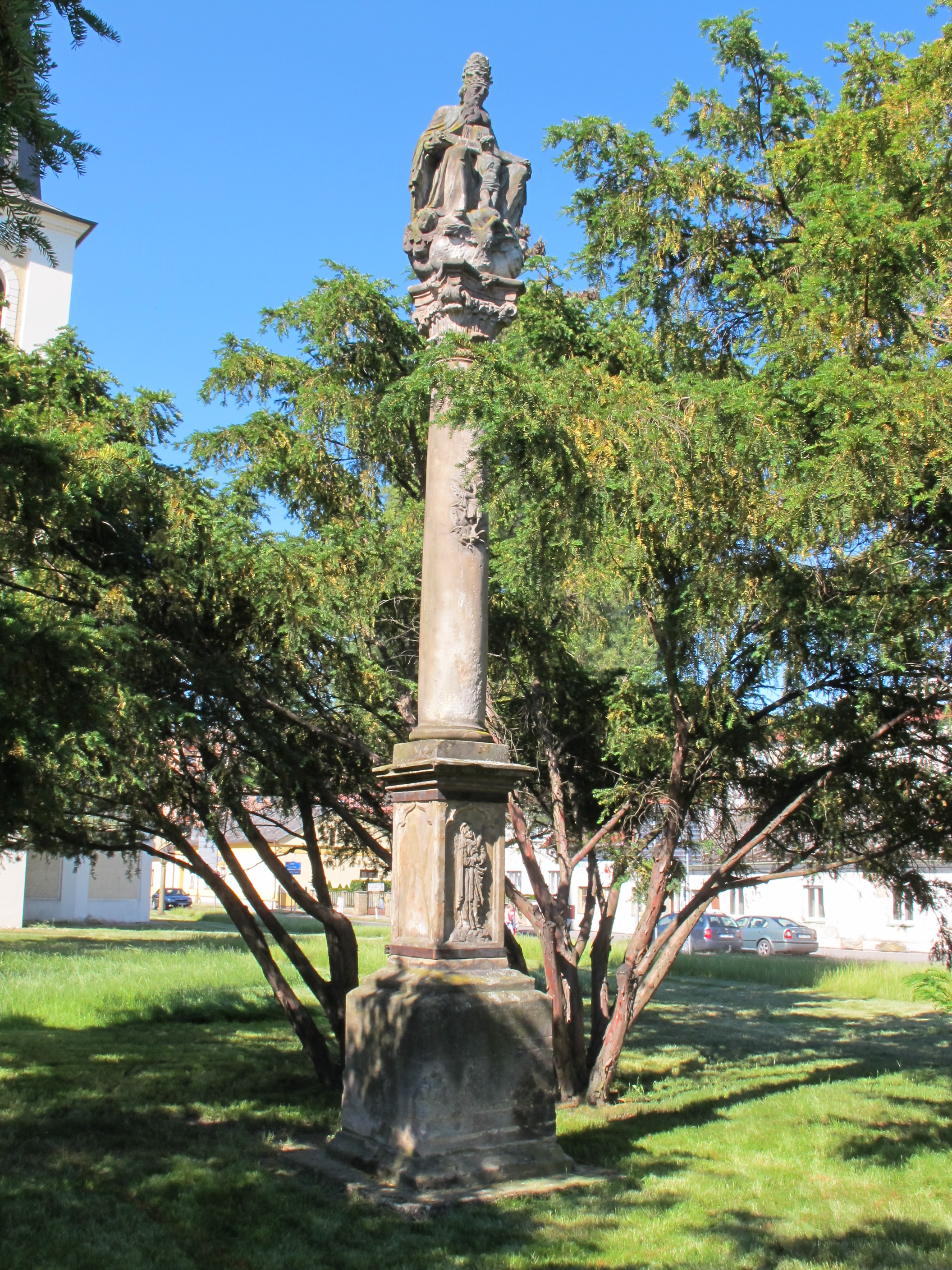 Sloup Nejsvětější Trojice, Staroměstské náměstí, Litovel. This file was uploaded during the project of WikiTown Litovel.